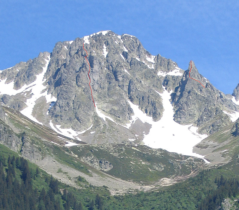 Itinéraire de la Chapelle de la Glière